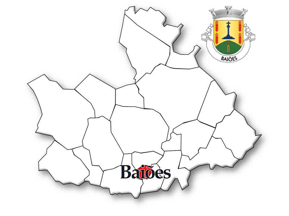 Mapa das Freguesias